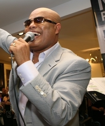 El cantante de merengue dominicano Rubby Pérez.